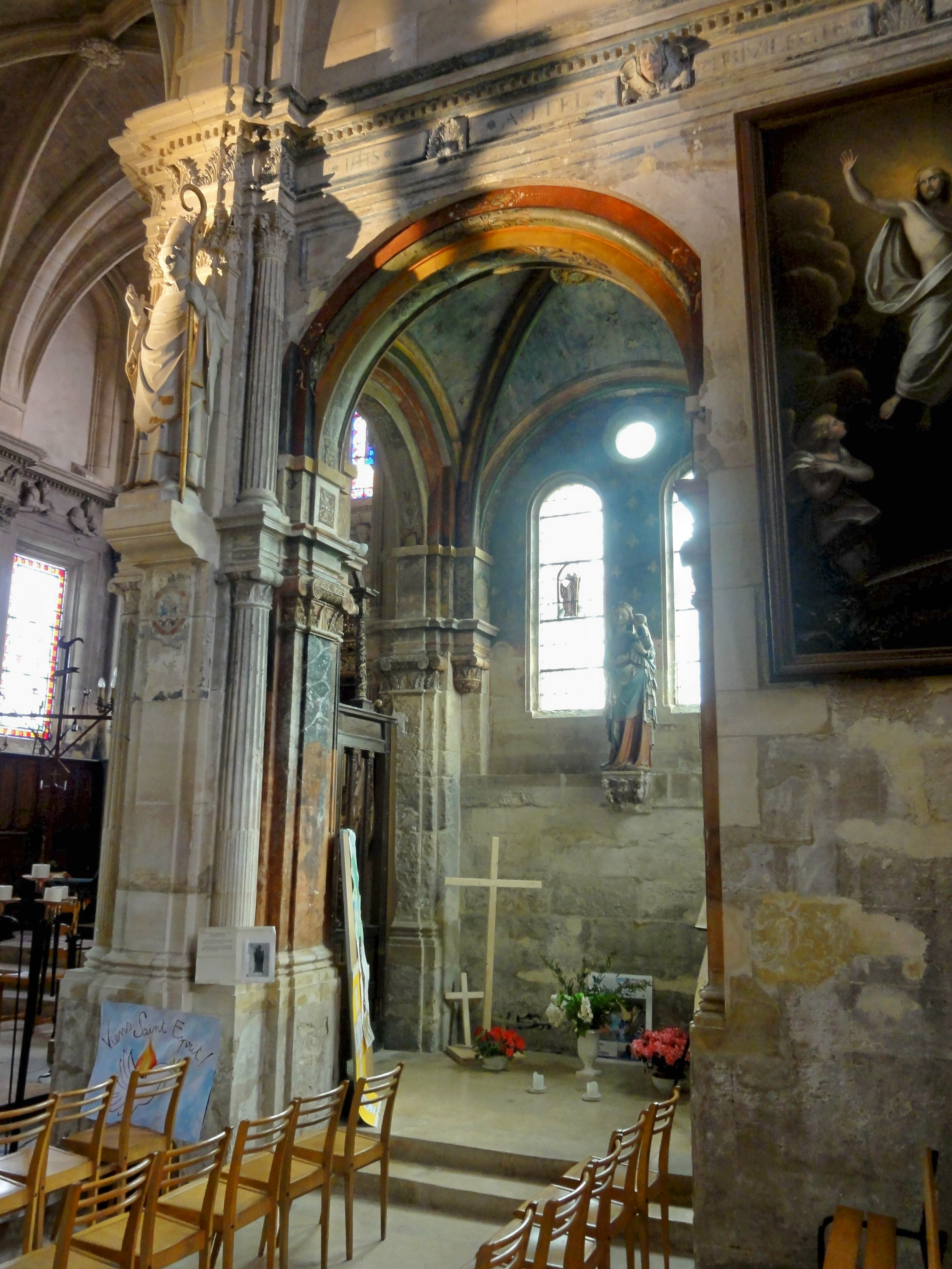 Chapelle Renaissance.